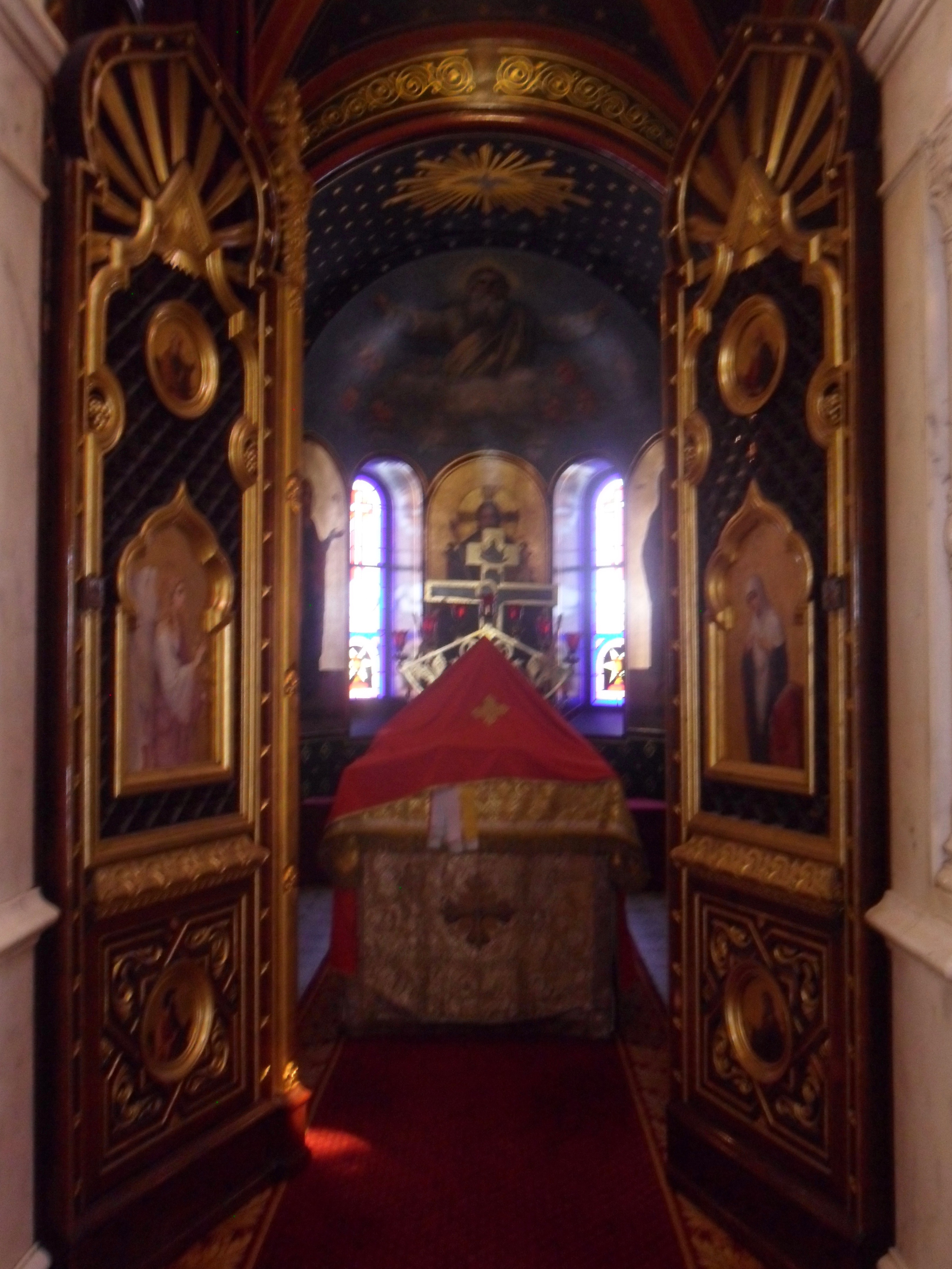 Chœur de l'Église russe de Genève